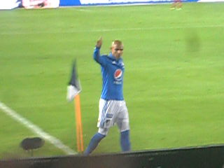 Jonathan Estrada con Millonarios en el Campin.